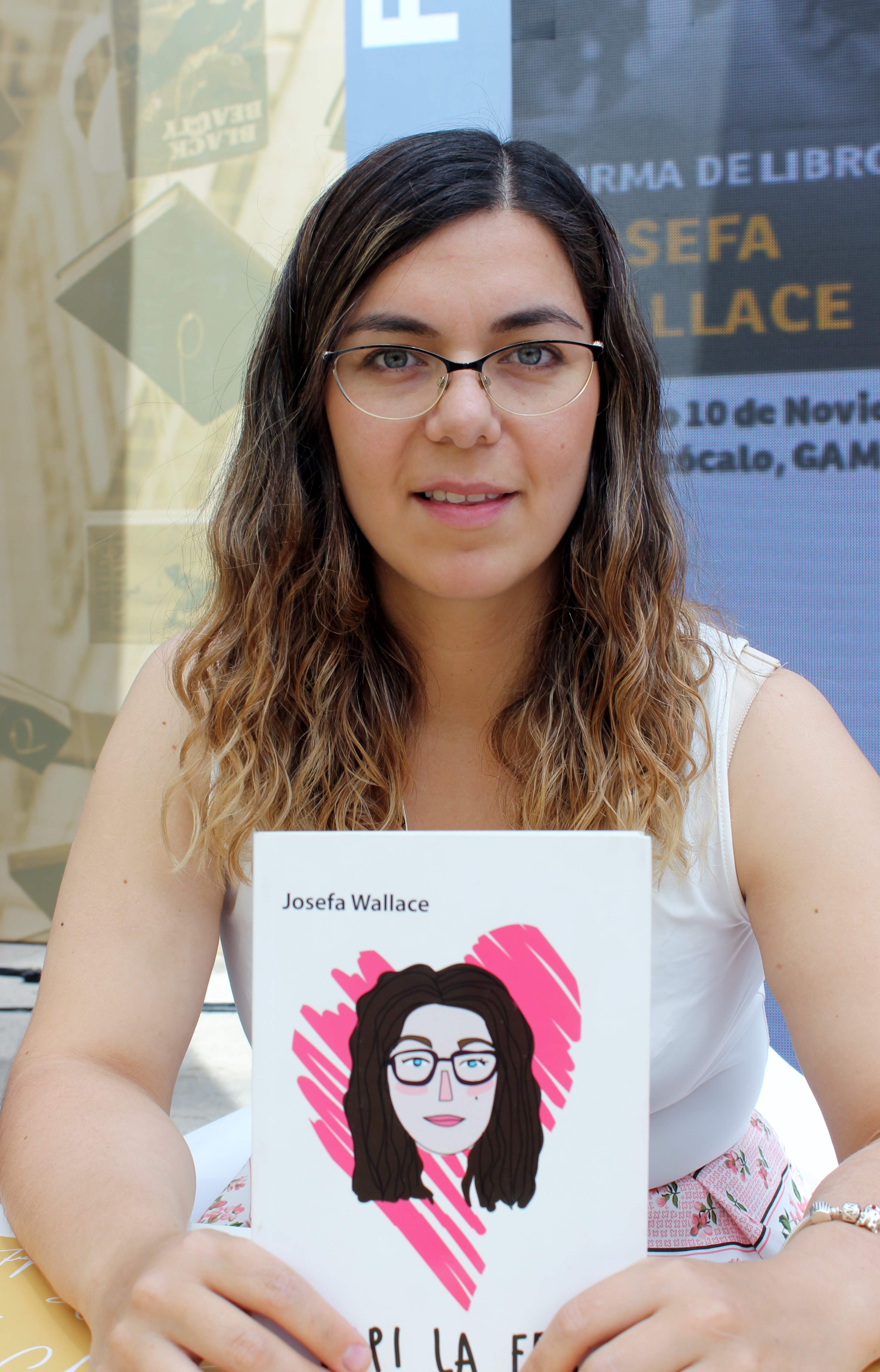 La escritora chilena Josefa Wallace durante una sesión de firma de libros en la segunda etapa del Festival de Autores de Santiago 2018 realizada en el GAM.